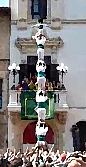 Pilar de 6 aixecat per sota del Falcons de Vilafranca